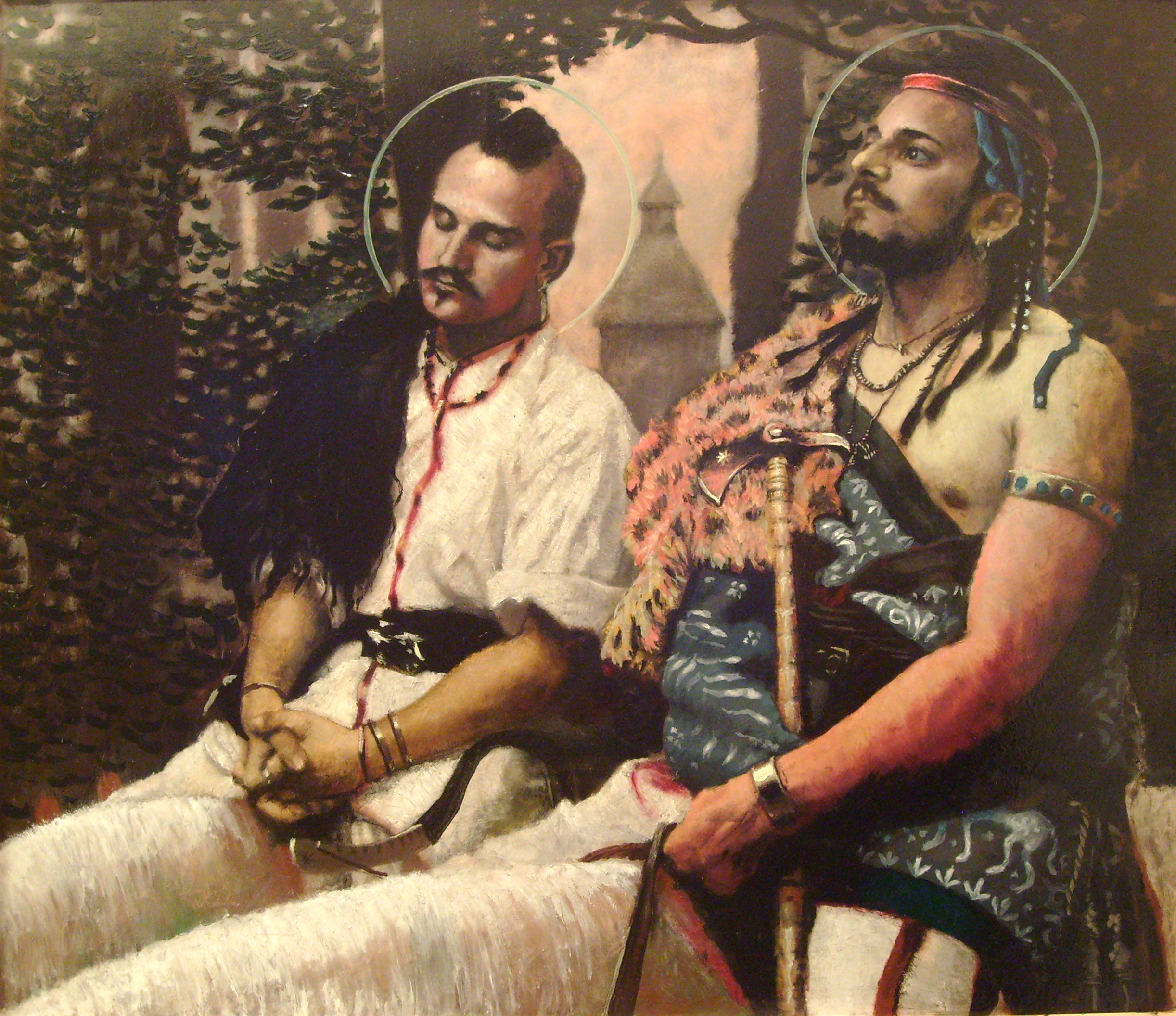 Buda és Attila avagy Imádkozó hercegek